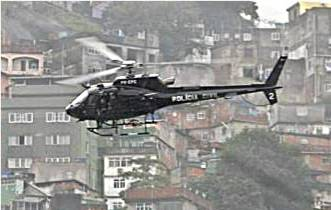 Police Helicopter(Police of Rio de Janeiro)